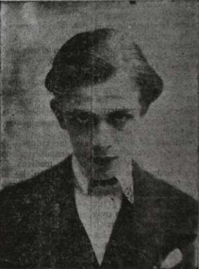 Foto de Augusto San Miguel, pionero del cine ecuatoriano.